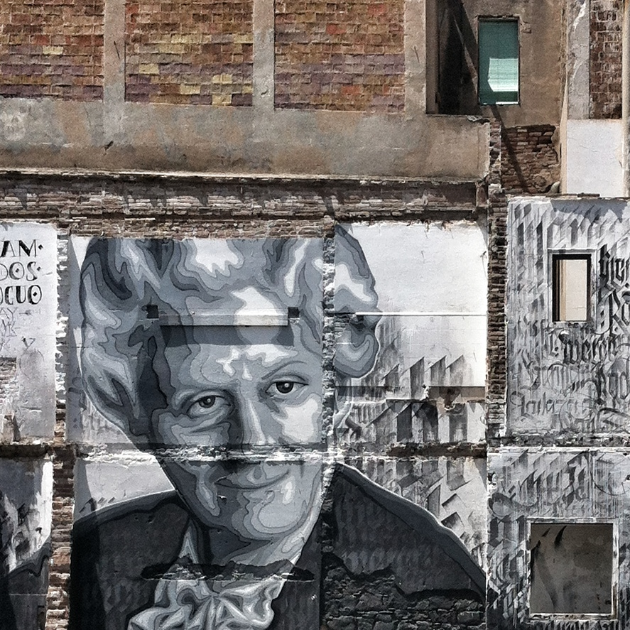 Carrer Numància 163. Imatges de l'exposició Descobreix les 10 Barcelones, una exposició fotogràfica que explora els racons més singulars i menys coneguts dels deu districtes barcelonins. Reconegudes amb la seva incorporació al banc d'imatges de la Viquipèdia, les 100 imatges que componen la mostra s'han escollit entre les més de 3.000 presentades al concurs de fotografia mòbil convocat per a l'exposició. Es tracta d'un projecte col·laboratiu creat pels ciutadans per captar l'essència menys tòpica de la ciutat. Ho organitza: Ajuntament de Barcelona i Dive. Amb la col·laboració de Descobreix Catalunya, Instagramers i Amical Wikimedia